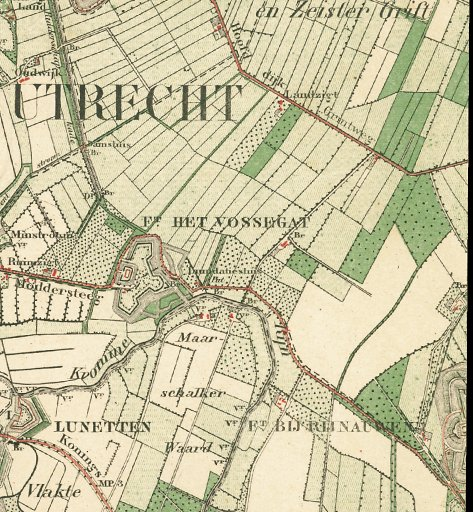 Fort Vossegat en Lunetten op de Houtense Vlakte met omgeving aan de zuidzijde van de stad Utrecht in 1874 op een Militaire Topografische Kaart.